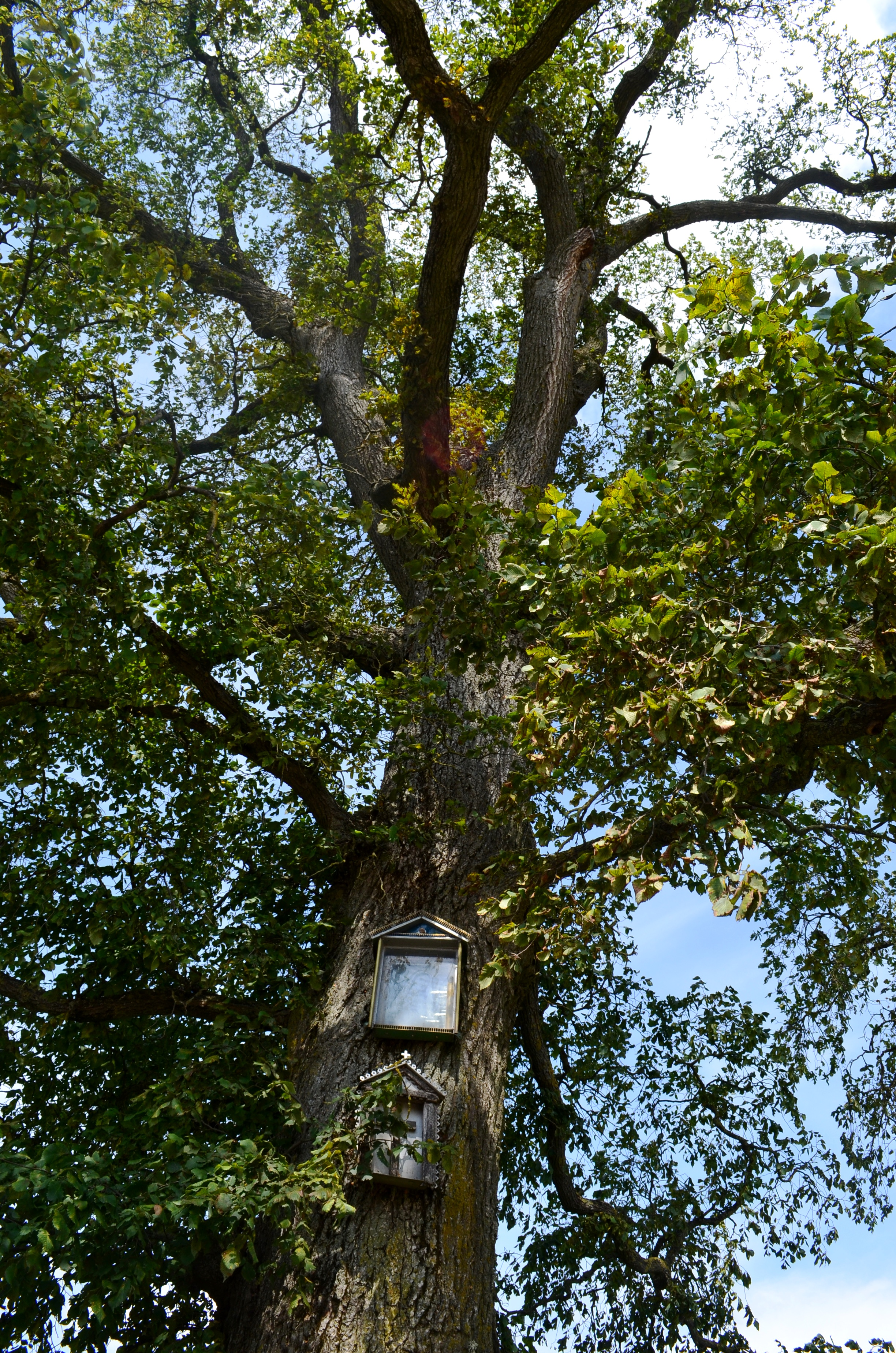 Medis (vinkšna?) su šventais abrozdėliais, Šukioniai, Truskavos sen., Kėdainių raj.